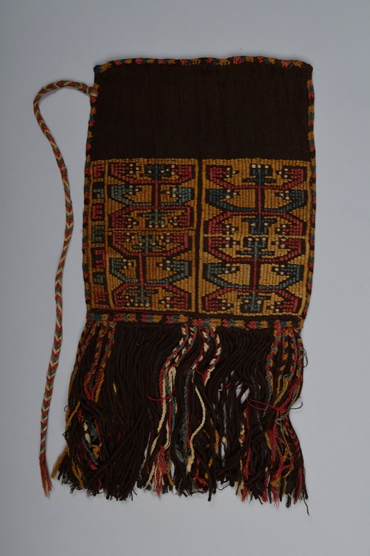 Borsa con frangia d'ordito e con cordoncino che funge da manico. Ordito e trama: lana di camelide di colore marrone a due capi, filata a Z e ritorta ad S. Ricami, ornamenti della frangia, rifiniture, cuciture e manico: lana di camelide di colore bianco, azzurro, rosso e ocra a due capi, filata a Z, ritorta ad S, impiegata doppia. La borsa è costituita da una striscia rettangolare di tela a faccia di ordito, ripiegata, cucita ai lati e rifinita nelle cuciture, nell'imboccatura e alla base da tre giri ornamentali a maglie incrociate multicolori e da una frangia a trame che slegano. La decorazione interessa i due terzi inferiori della borsa: è effettuata a ricamo simulante l'arazzo ed è a due dritti. Il ricamo sfrutta la tela di fondo, che ne è lasciata priva attorno al motivo decorativo principale, che è così delineato dal colore marrone della tela stessa. La decorazione principale presenta quattro volte una figura a braccia distribuita in due registri decorativi. Questa figura è formata da un braccio centrale da cui si dipartono le braccia laterali; probabilmente stilizzazioni di una divinità mostruosa nasca conosciuta come Anthropomorphic Mythical Being.